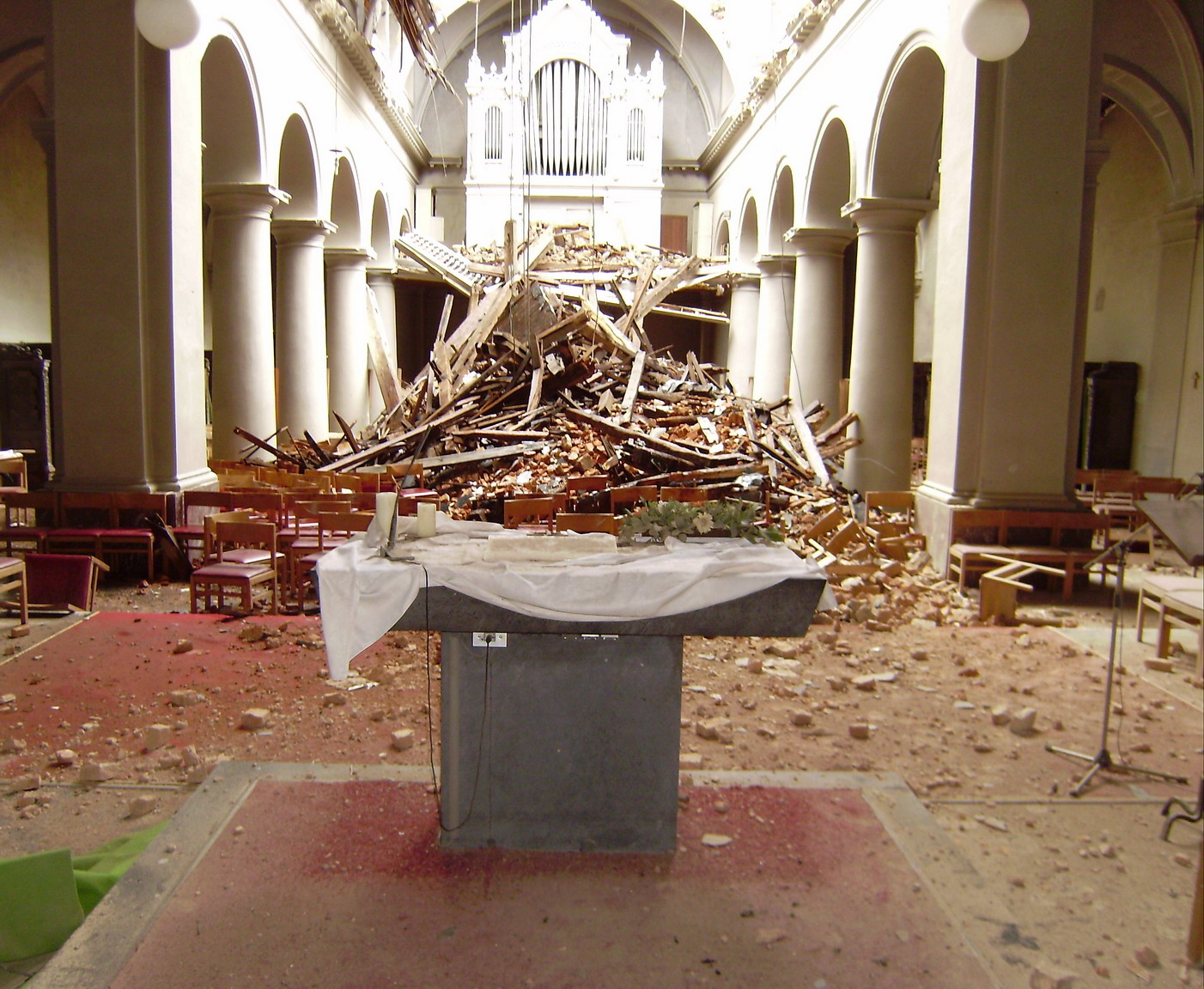 l'intérieur de l'église de Ciney après le passage de la tempête